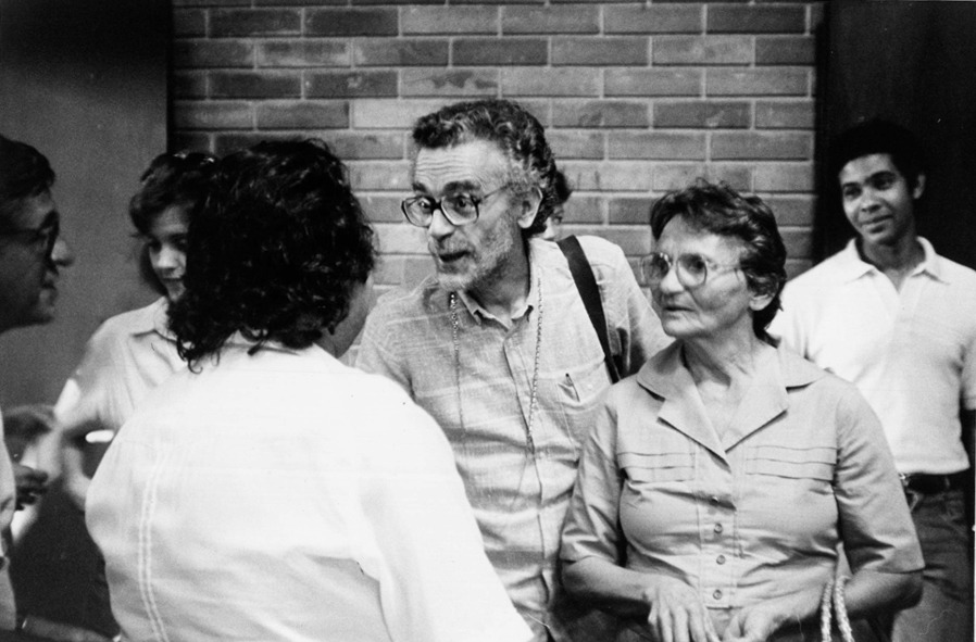 Em 1964, Elizabeth Teixeira aceitou o convite para participar de um filme, ia interpretar ela mesma numa ficção que contaria a história das Ligas Camponesas e do assassinato de João Pedro Teixeira (marido de Elizabeth). O golpe militar interrompeu as filmagens. Os negativos do filme foram escondidos, e no certo tempo ficou sob a guarda da Cinemateca MAM-RJ, sob o codinome: "ROSA DO CAMPO". Vinte anos depois, o cineasta Eduardo Coutinho, retoma o projeto: “CABRA MARCADO PARA MORRER".